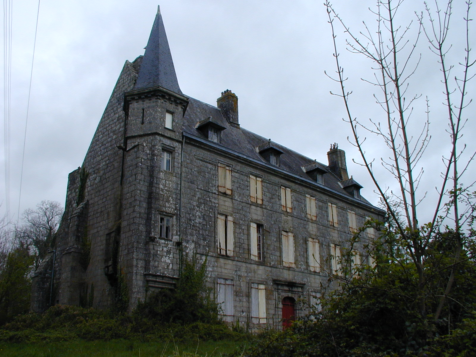 Chateau La Boissière